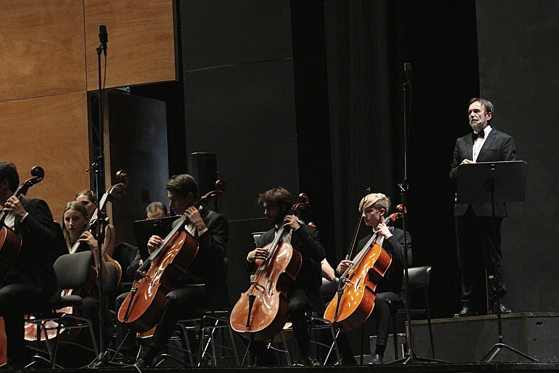 Luigi Dei durante la Notte del Bolero al Teatro Dell'Opera di Firenze